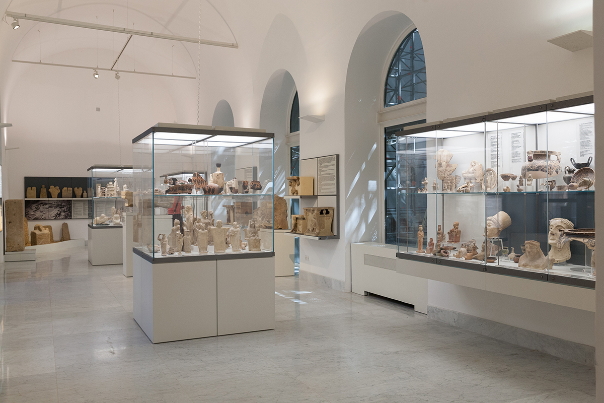 Sala dedicata ai santuari selinuntini presso il Museo Archeologico Salinas